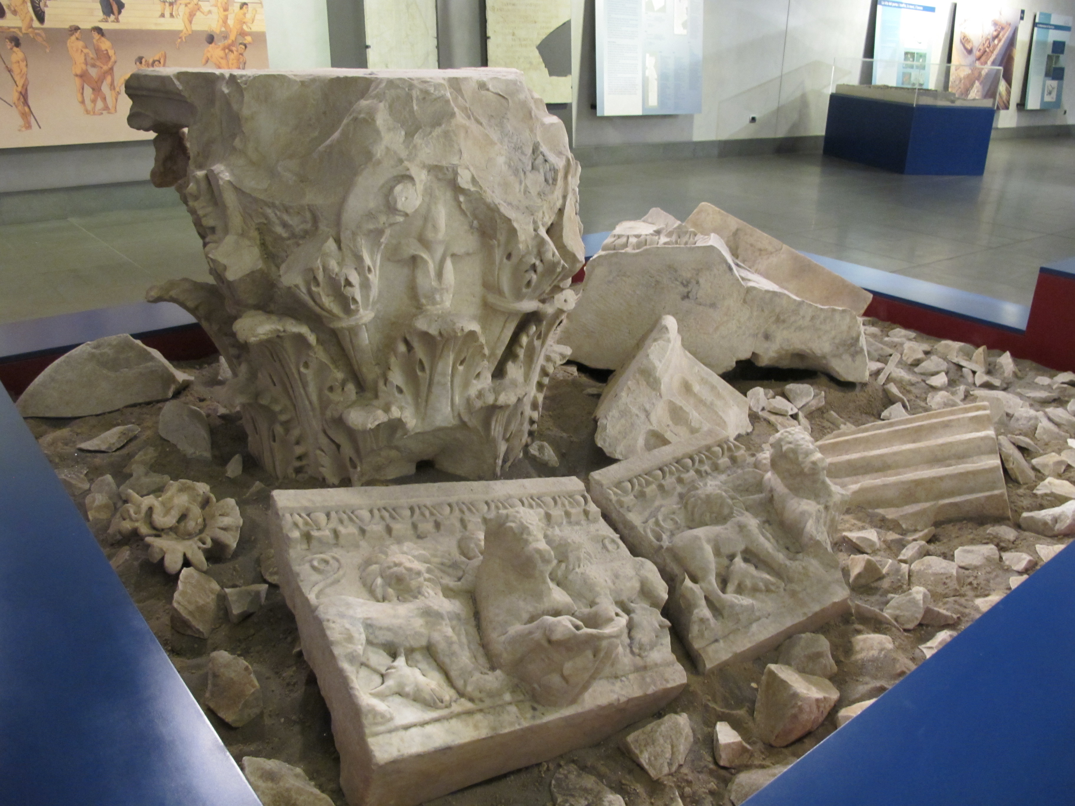 Reperto della Stazione Neapolis della città omonima